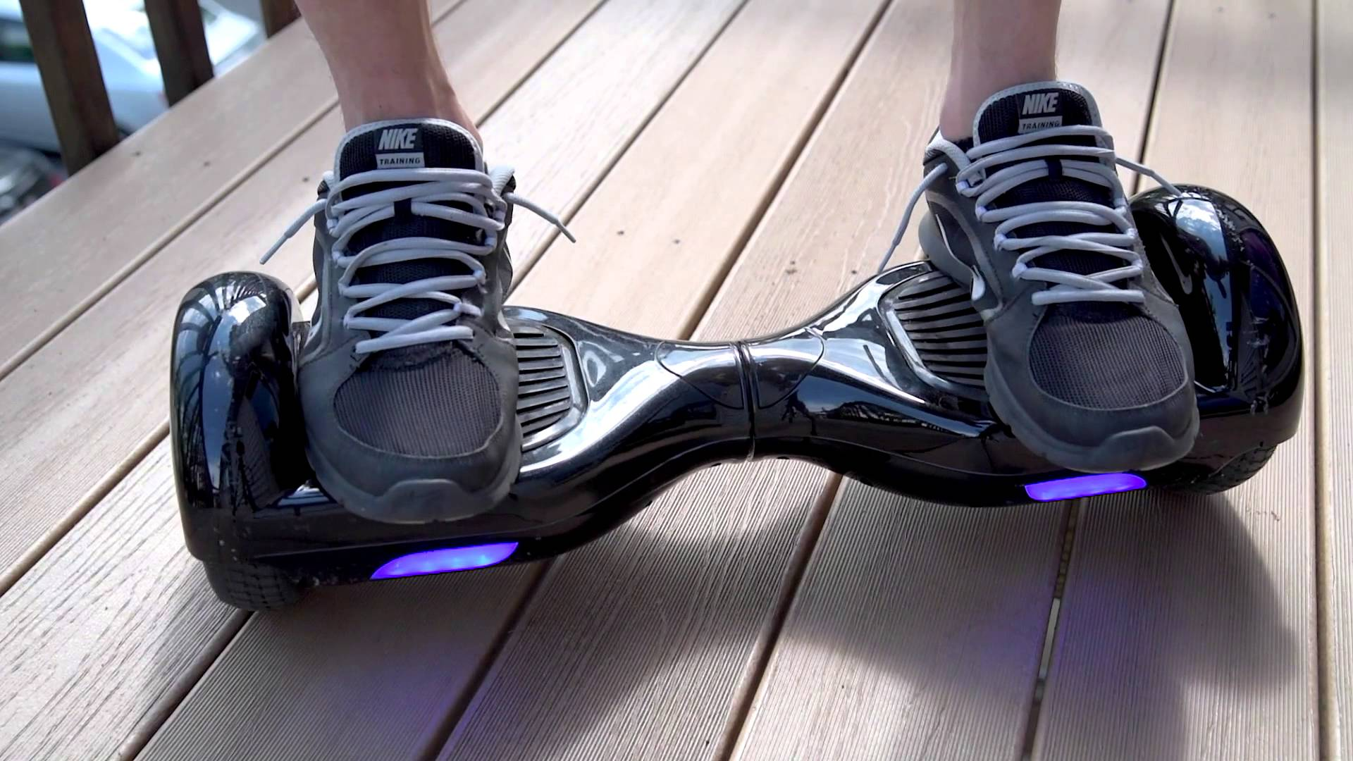 Човек на ховърборд(скутер)